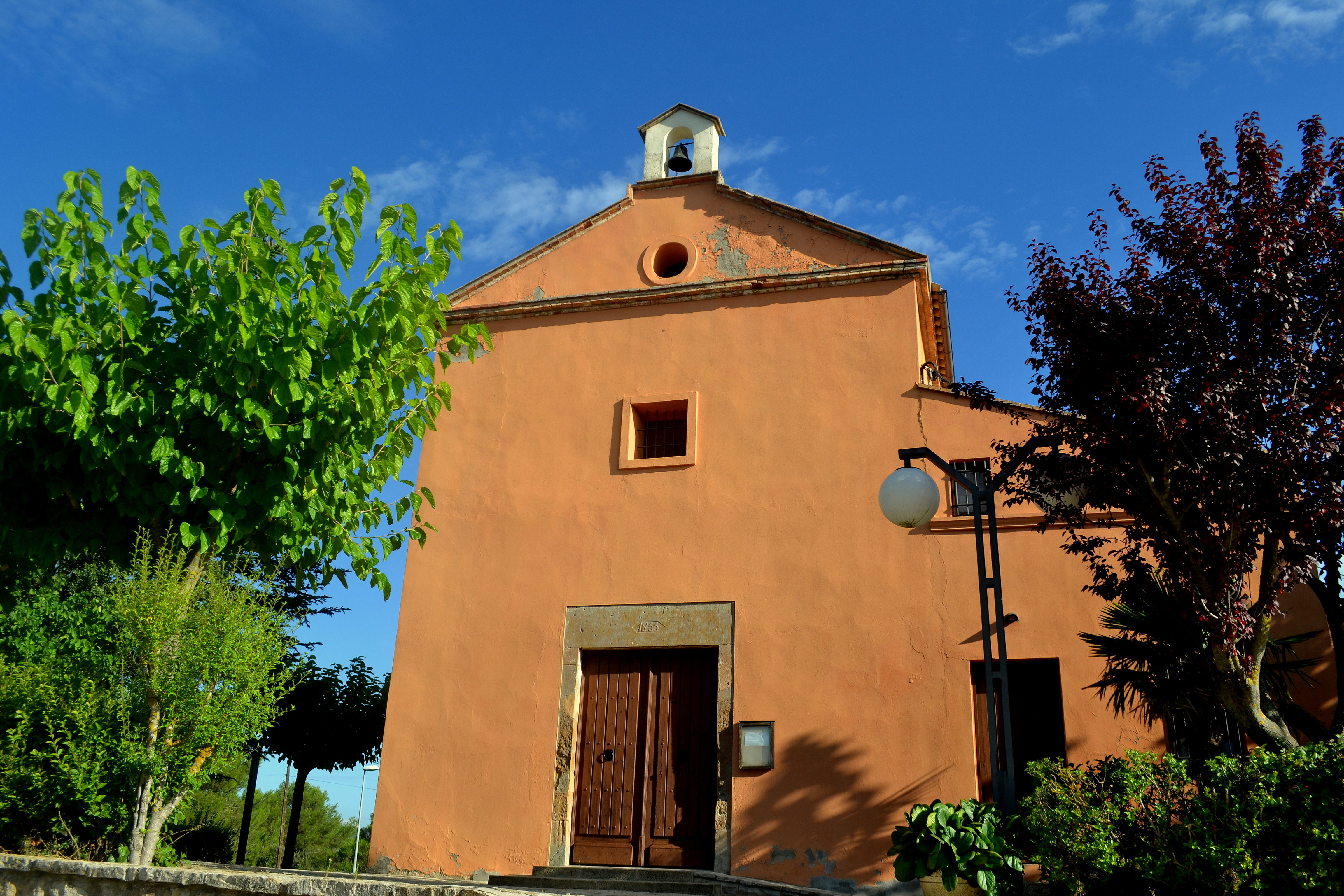 Església de Santa Maria (Castellfollit del Boix)